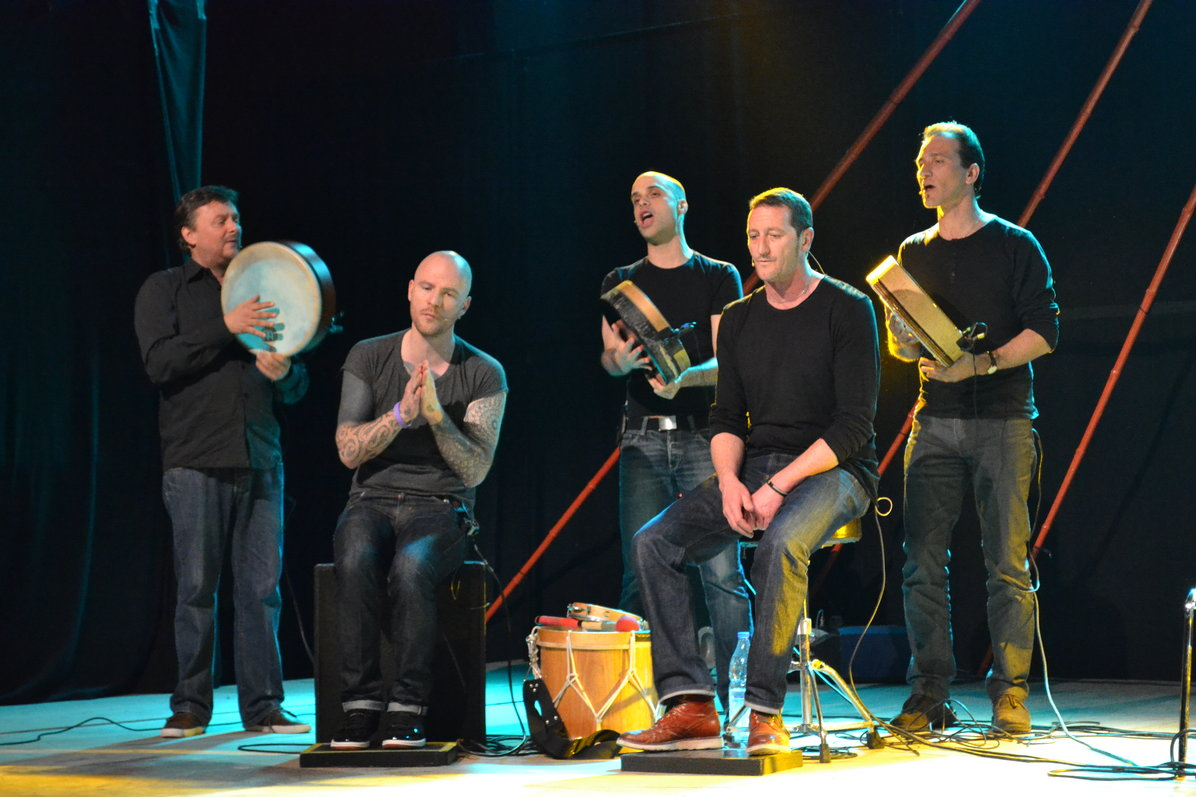 Lo Còr de la Plana in 2014.